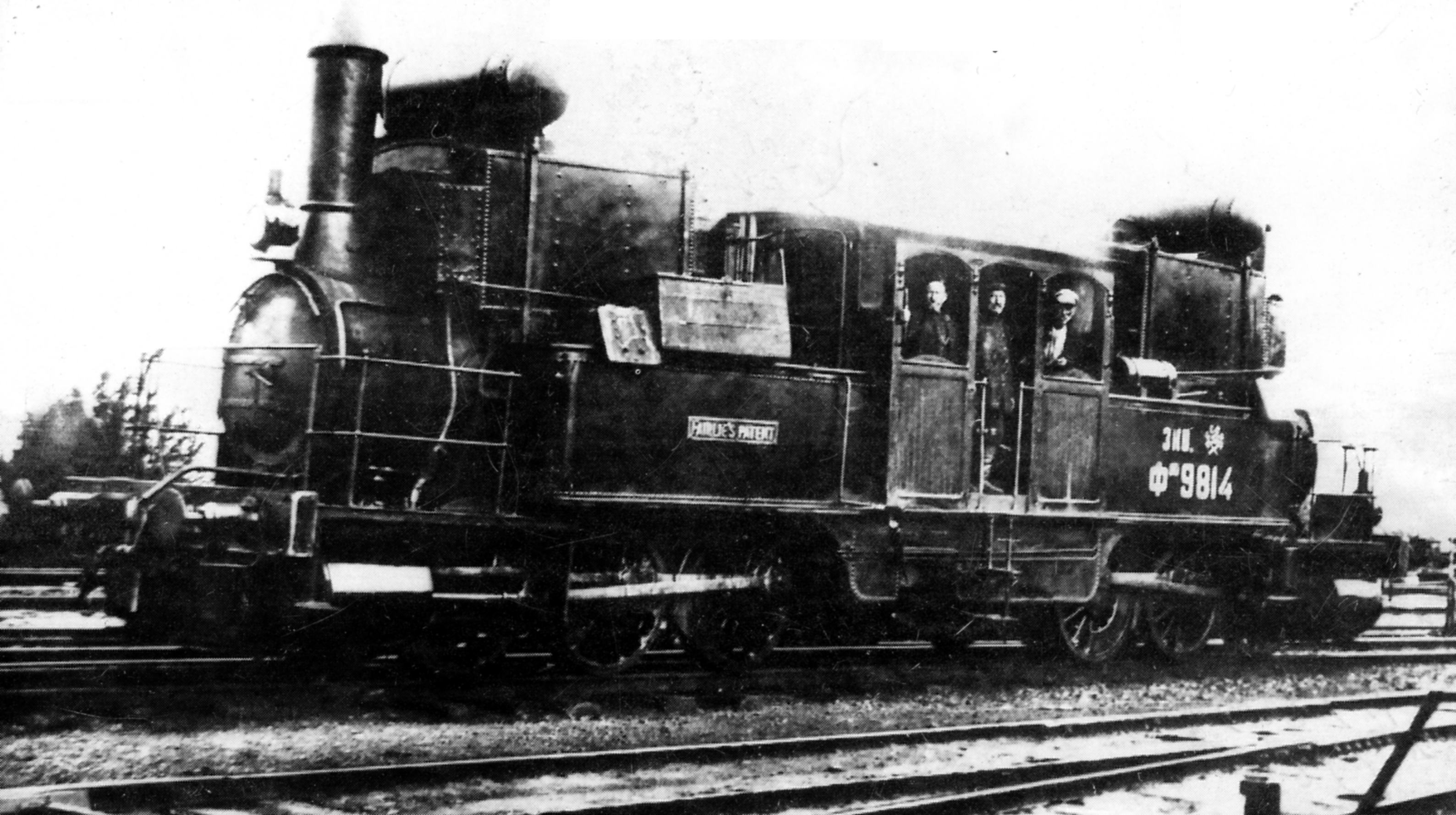 Танк-паровоз Фк